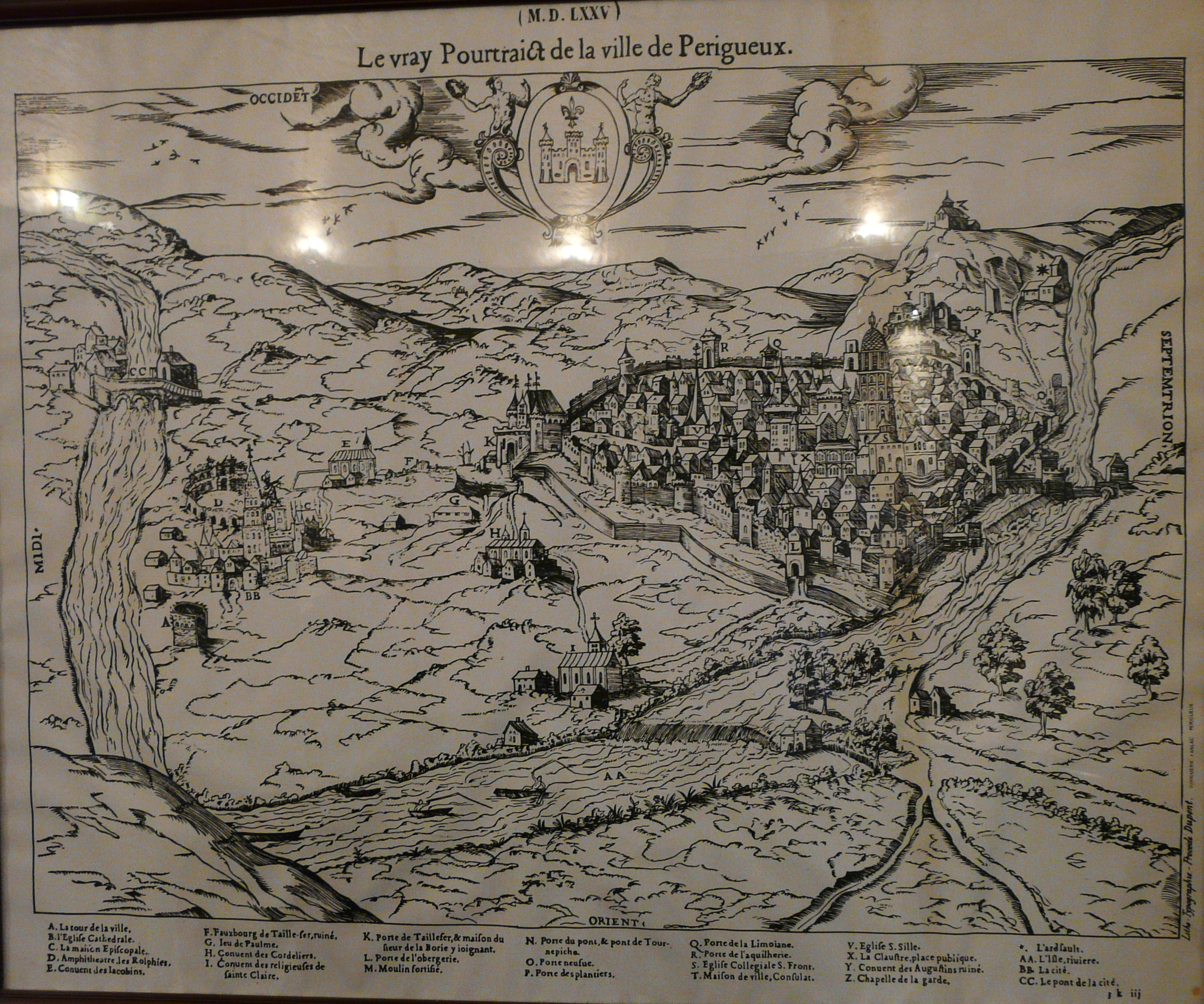 Dessin de 1575 de François de Belleforest représentant Le vray Pourtraict de la ville de Perigueux, typolithographie d'Auguste Dupont (1798-1850).